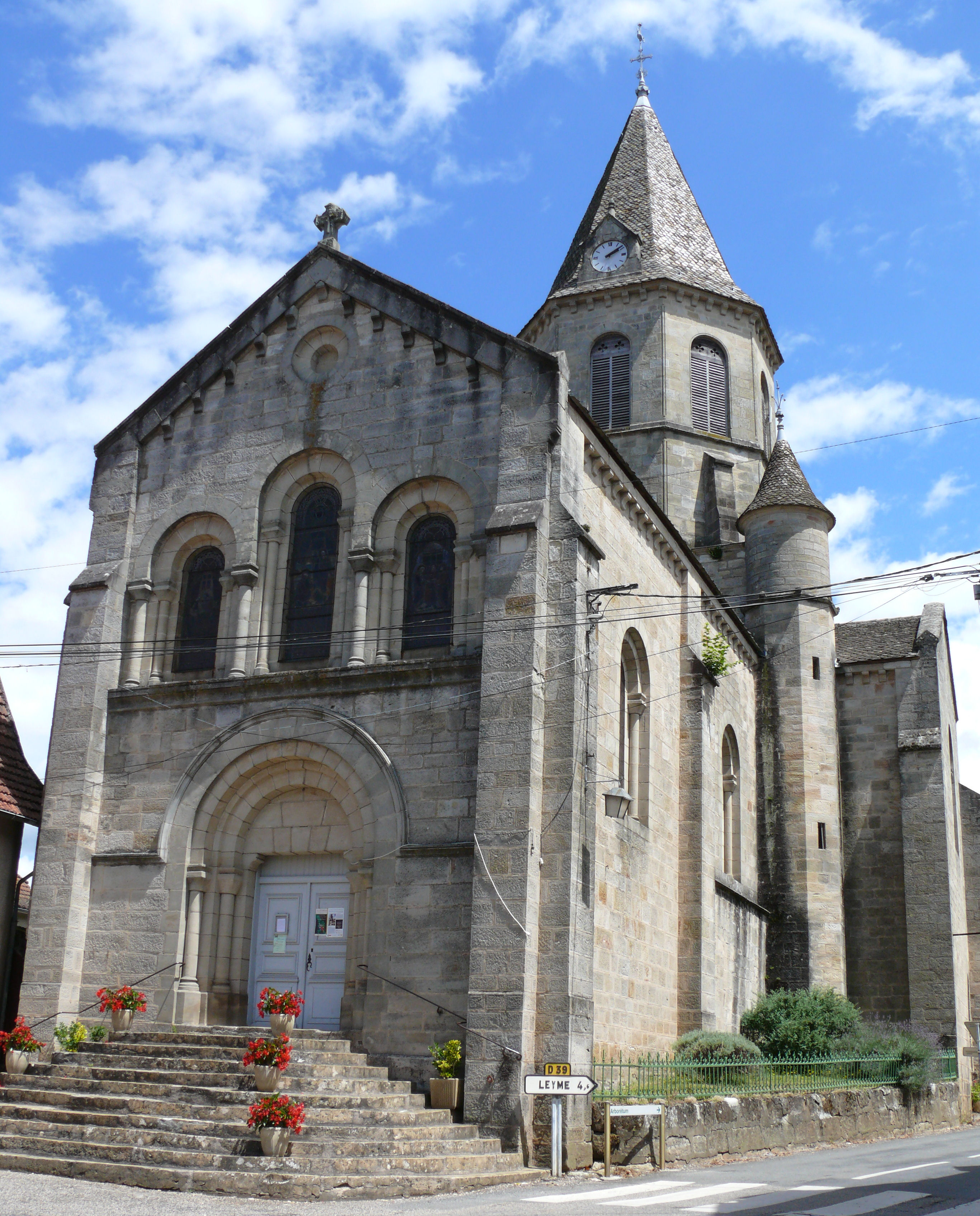 Aynac - Eglise Saint-Geniès